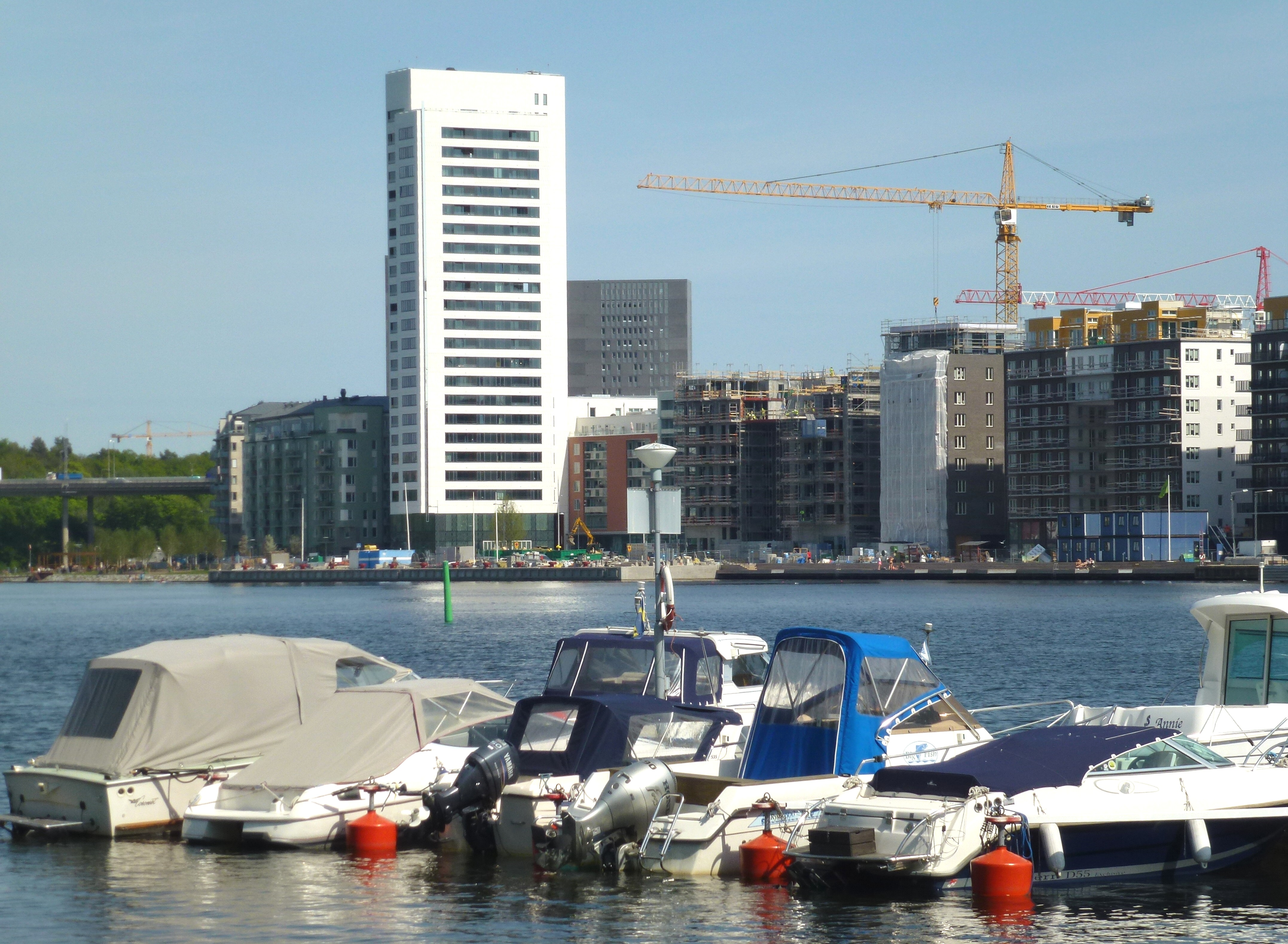 Hornsbergs strand och kv Lusten över Ulvsundasjön